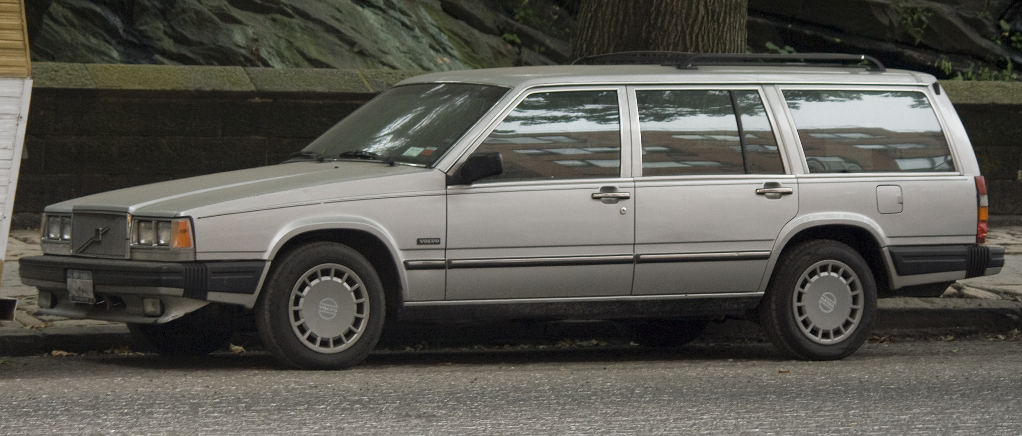 1989 Volvo 745 GL in NYC